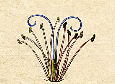 Ausschnitt (Klasse X) aus Ehrets Tafel "Methodus Plantarum Sexualis"